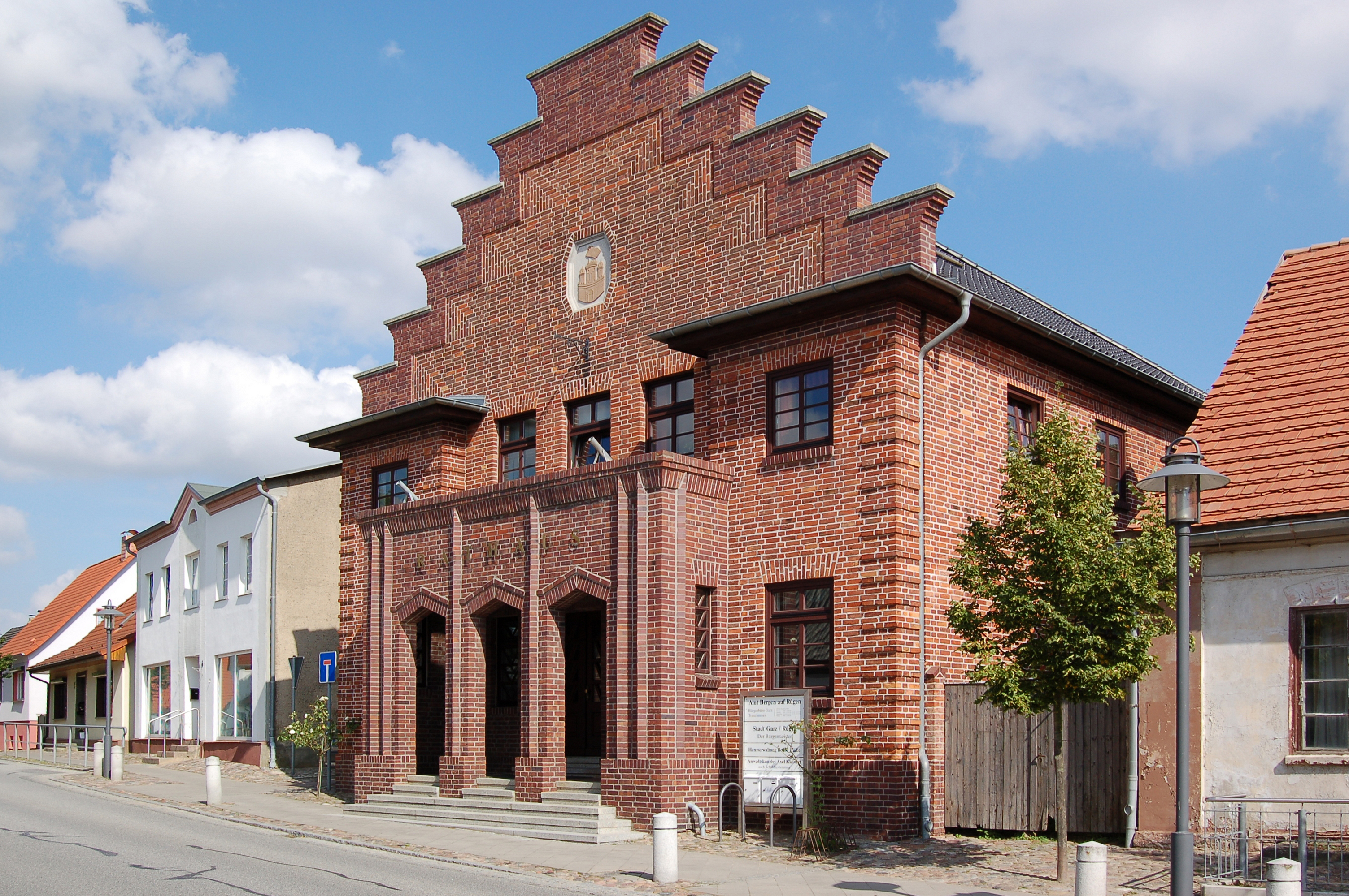 Der kleine Ort Garz liegt im Süden der Insel Rügen. Nach Stralsund sind es 23 Kilometer. Seit 2004 gehört auch die Halbinsel Zudar zum Ort. Südlich liegt einer der wenigen größeren Seen der Insel Rügen, der Garzer See. Sehenswert sind u. a. die ev. St.-Petri-Kirche, das Ernst-Moritz-Arndt-Geburtshaus bei Schloss Schoritz, das E.-M.-Arndt-Museum, die alte Schule, das Rathaus und die teilweise restaurierten Bürgerhäuser. Der Ortskern wurde im Rahmen der Städtebauförderung seit 1991 restauriert. Es gibt aber auch noch etliche Gebäude, an denen es noch viel zu tun gibt.